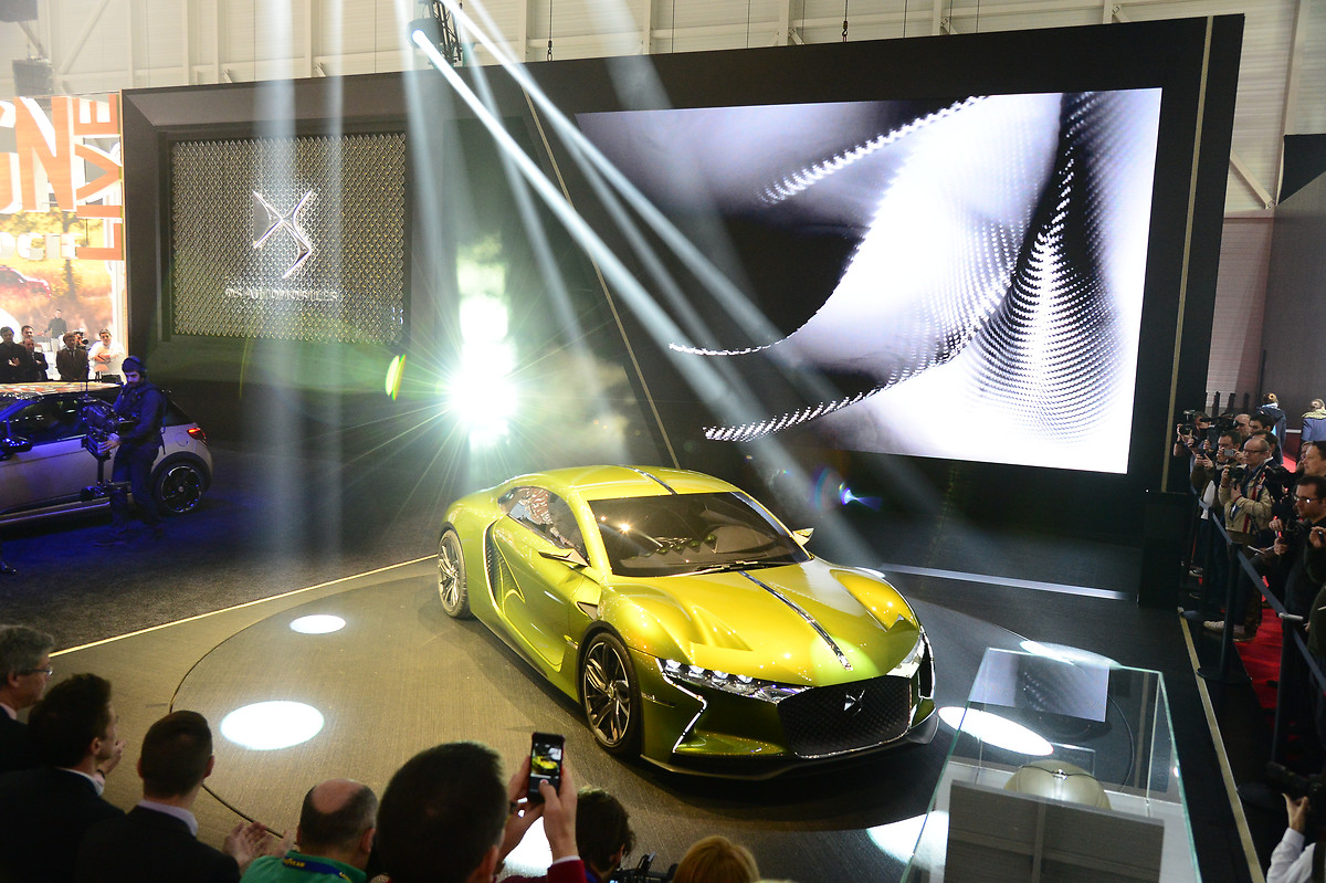 DS E-Tense in Genf 2016